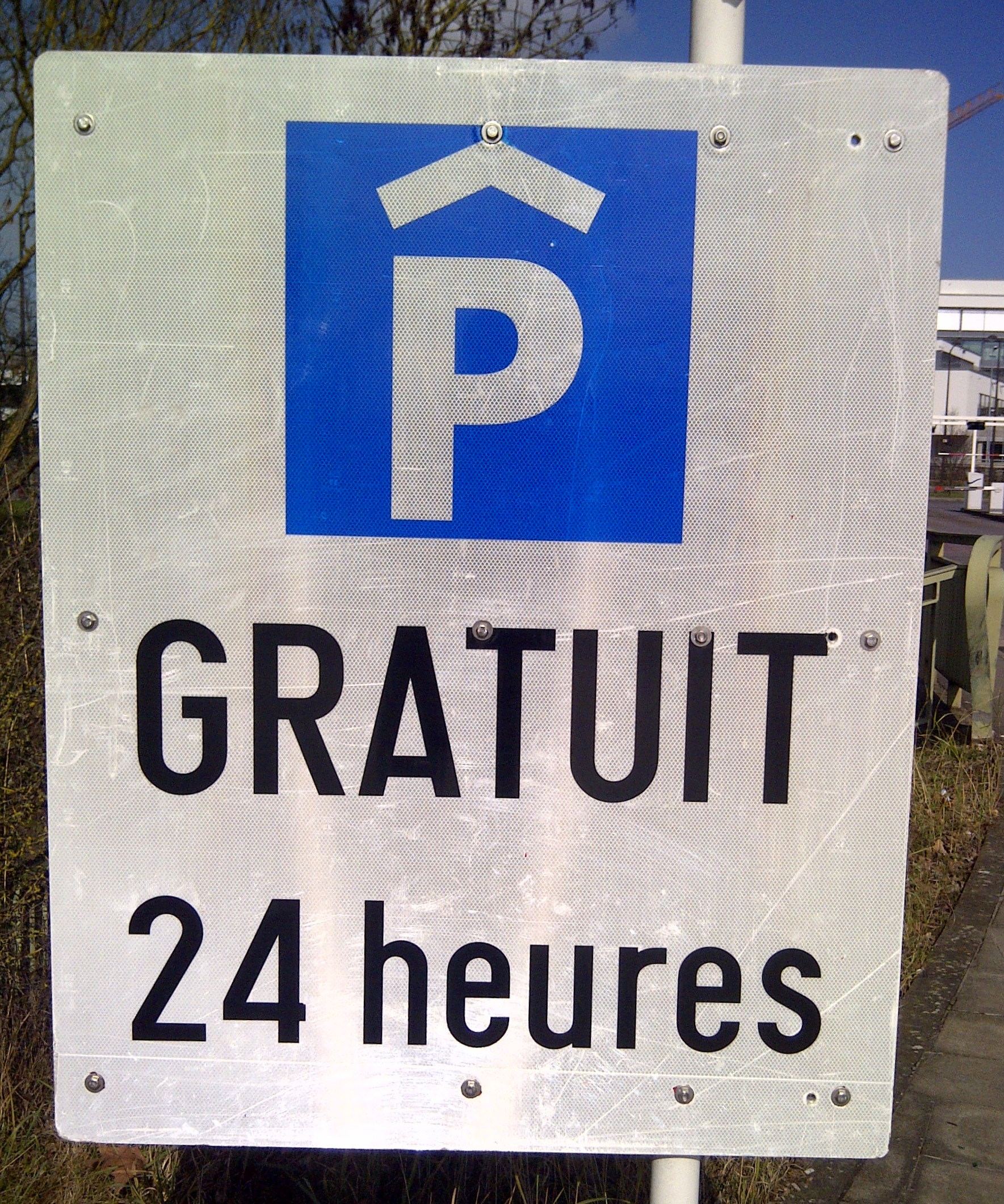 Verkéiersschëld E,23a "Iwwerdeckte Parking" aus dem lëtzebuerger Code de la Route; hei mat Tarifinformatioune vum Parking